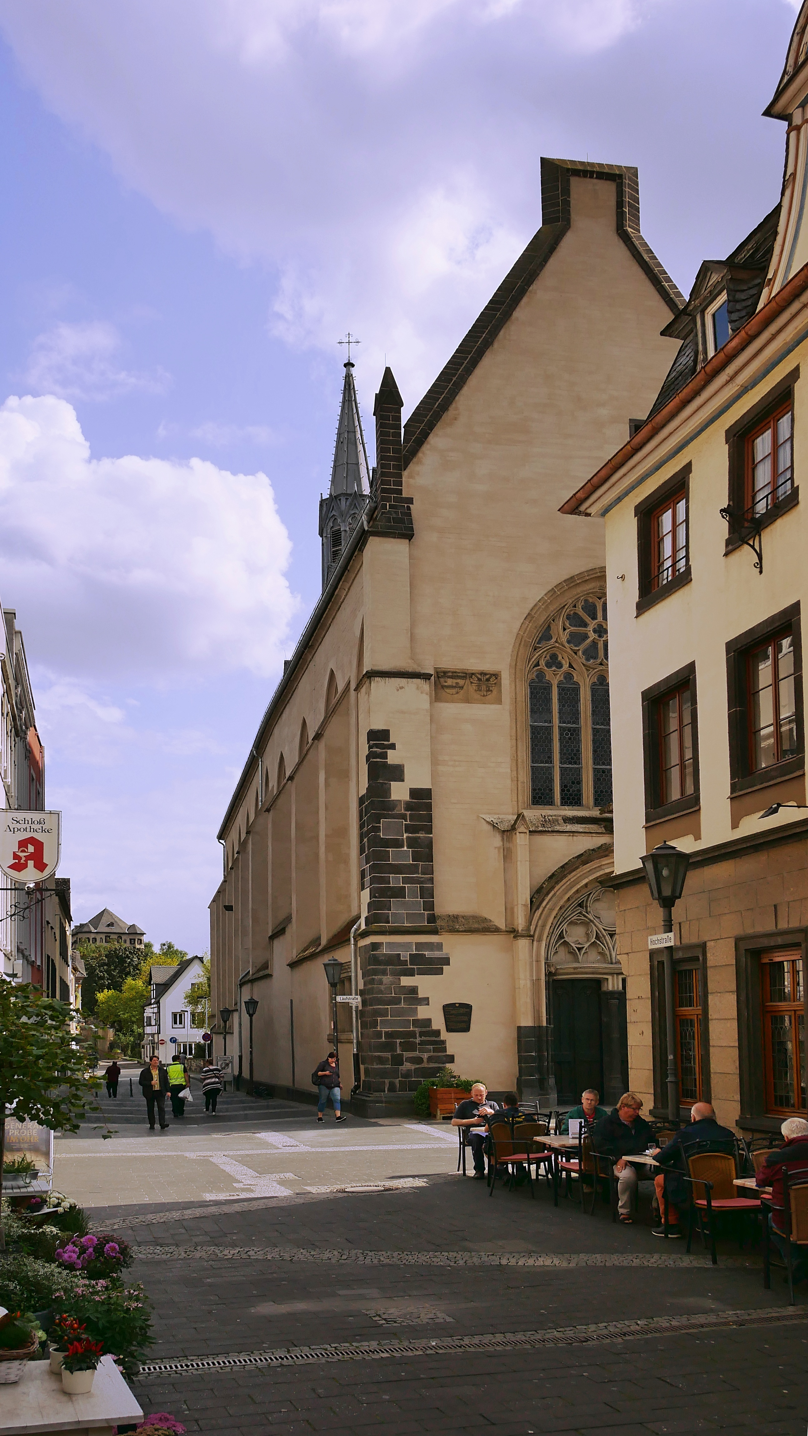 Evangelische Christuskirche Andernach aus der Fußgängerzone